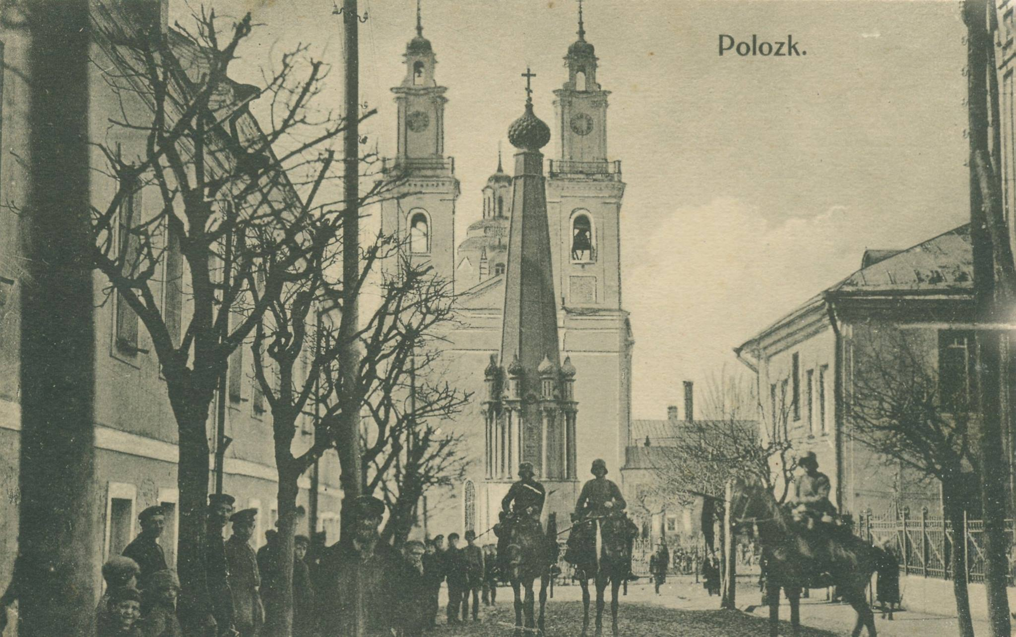 Беларуская (тарашкевіца): Полацак (Połacak), вуліца Віцебская (vulica Viciebskaja)